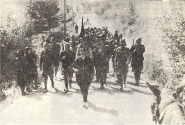 Srpskohrvatski / српскохрватски: Četnički odred Draže Mihailovića koji osigurava logor na Metinom brdu.